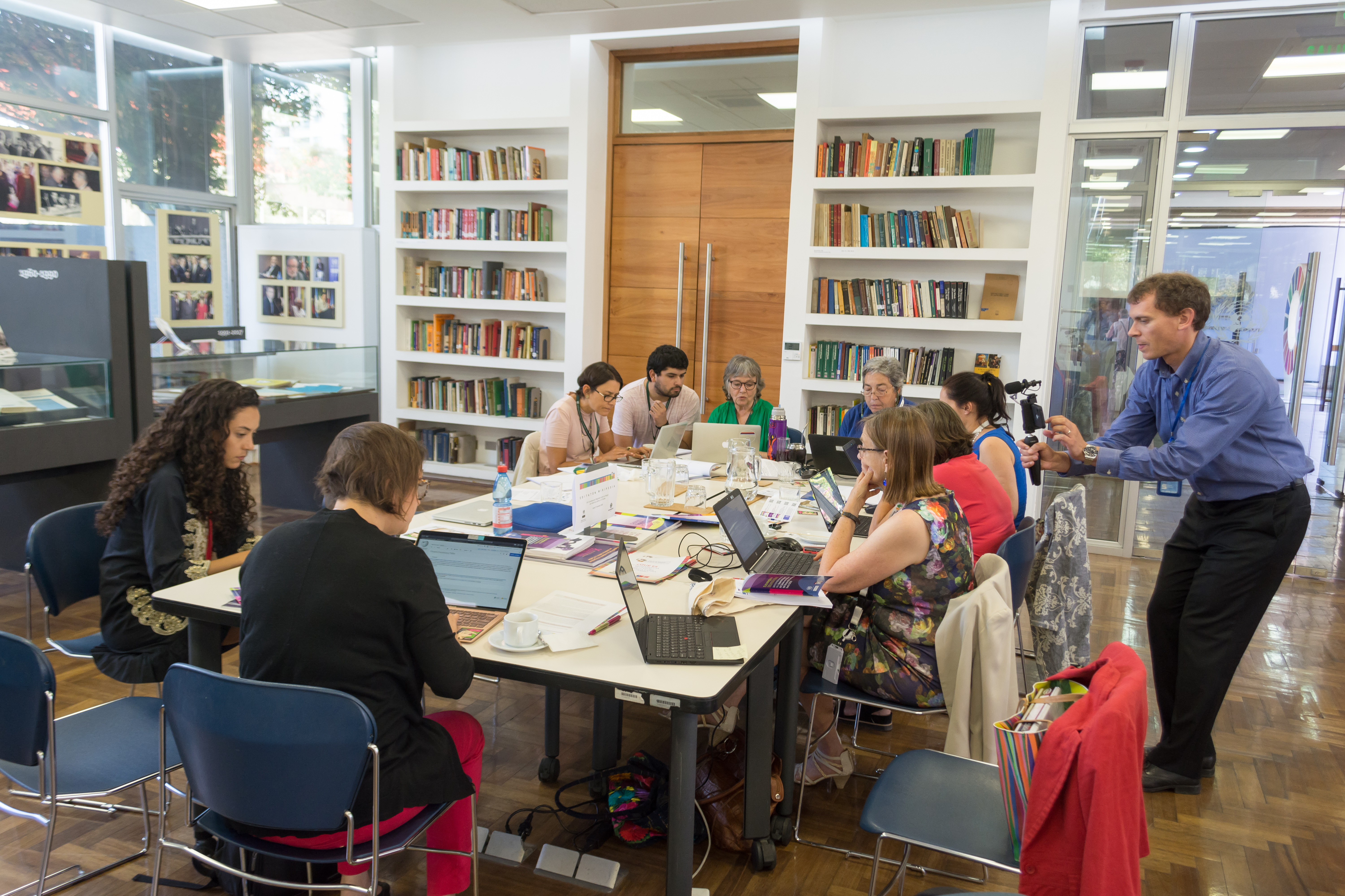 Editatón Conferencia Regional sobre la Mujer de América Latina y el Caribe, Biblioteca Hernán Santa Cruz, Cepal, Vitacura, Santiago, Chile